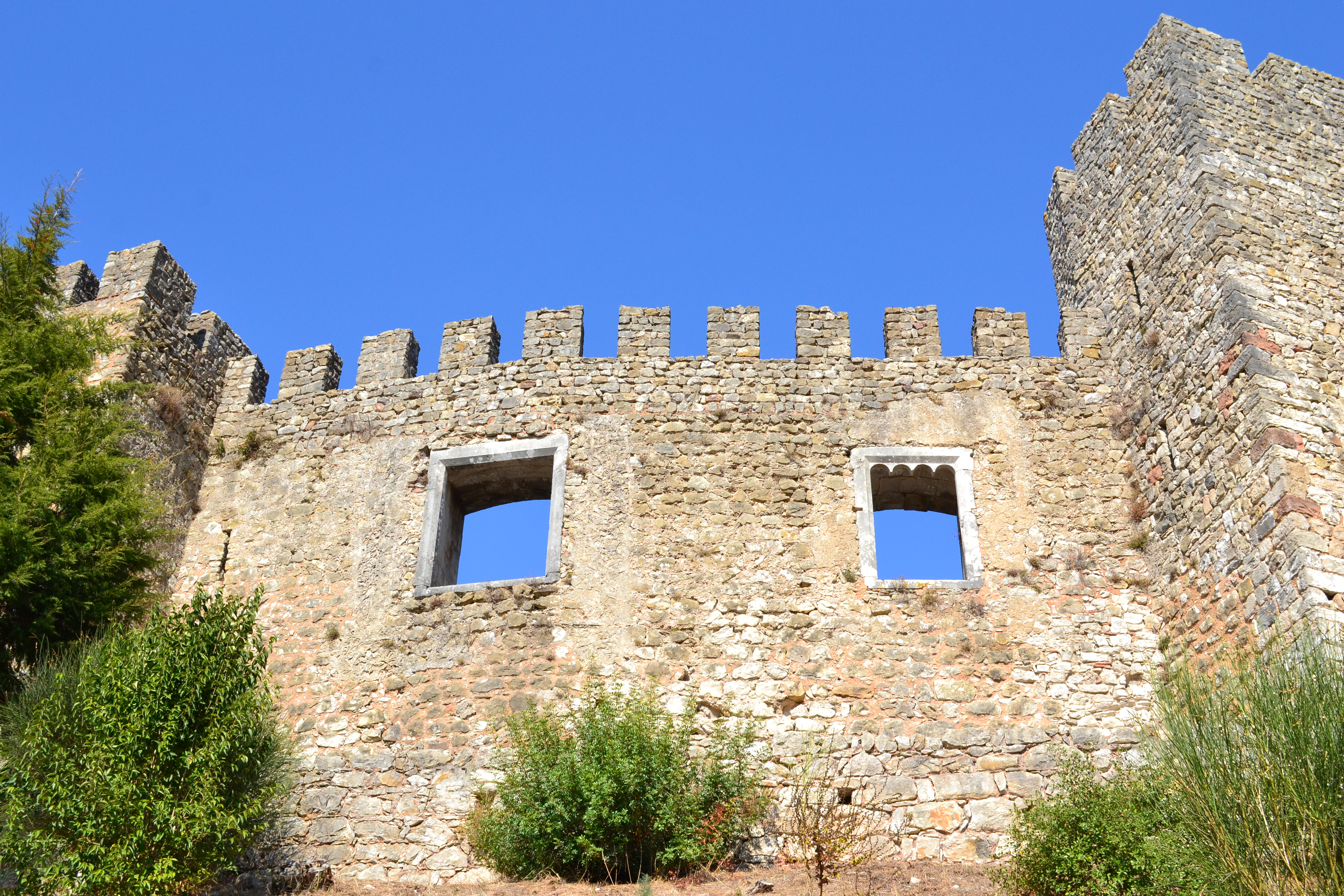 Castelo de Pombal This file was uploaded for Wiki Loves Monuments in Portugal with the unique identifier 71165.